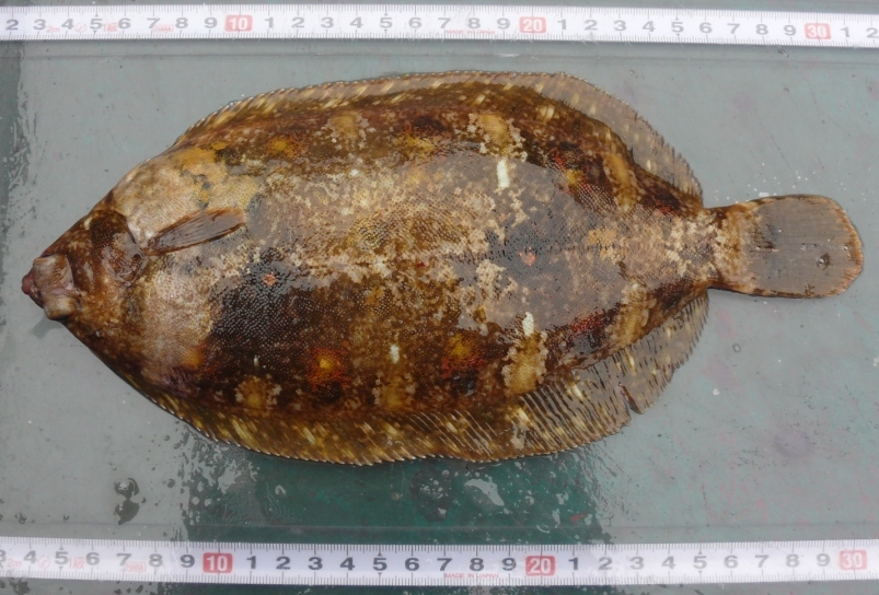 Малорот Ахне